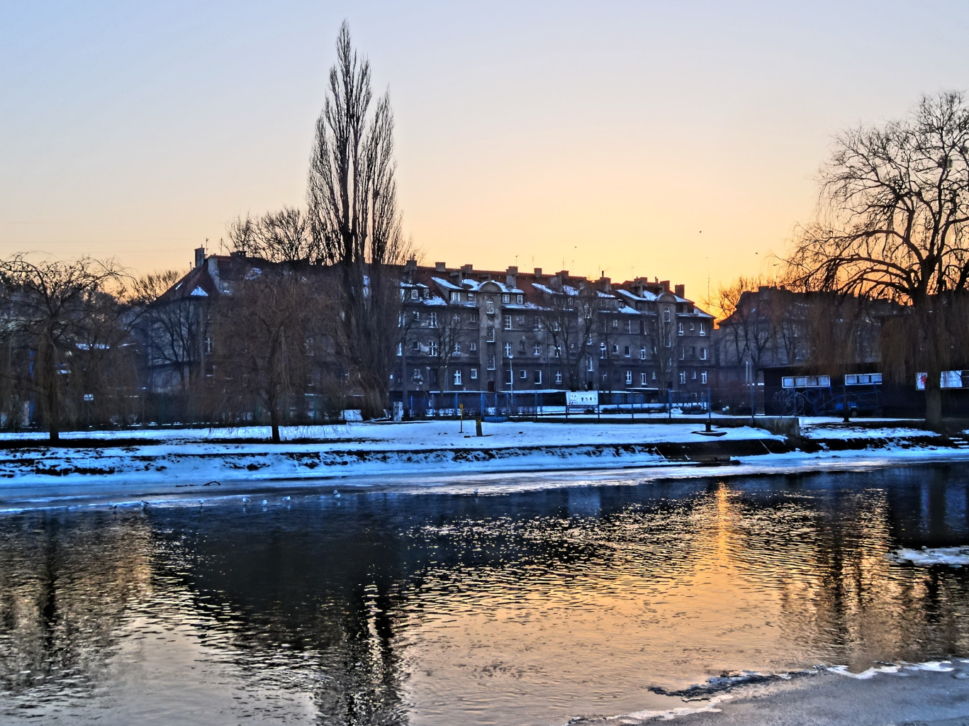 Brda na odcinku między mostem Bernardyńskim, a Trasą Uniwersytecką w Bydgoszczy